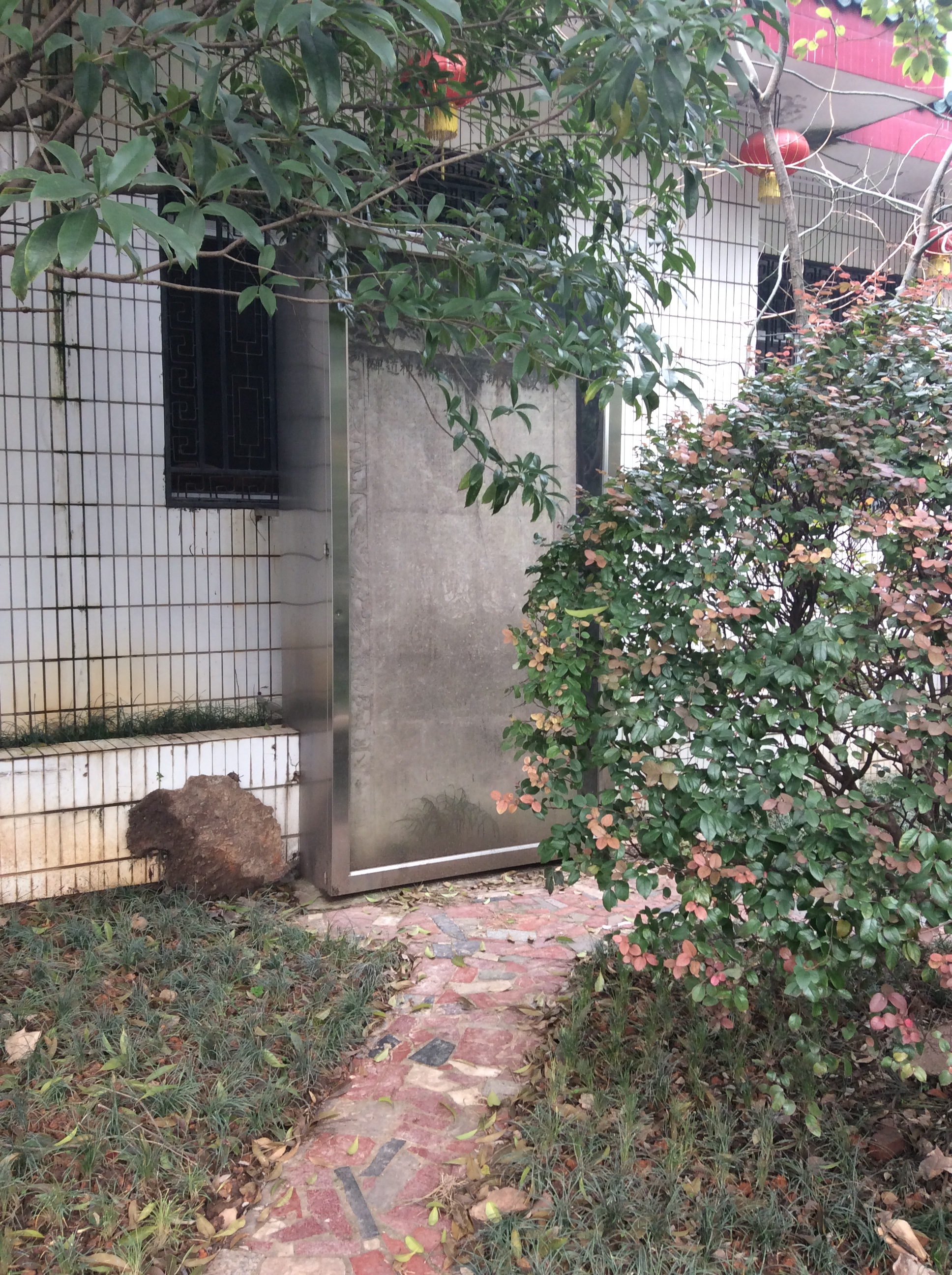 岳屏公园内的资政大夫湖北巡抚杨公神道碑